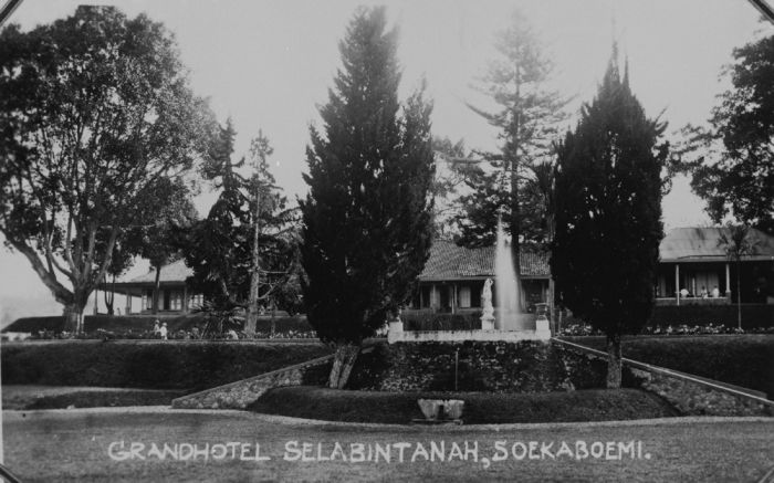 foto. Gezicht op het Grand Hotel Selabintanah met fontein in de tuin